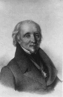 František Jakub Jindřich Kreibich